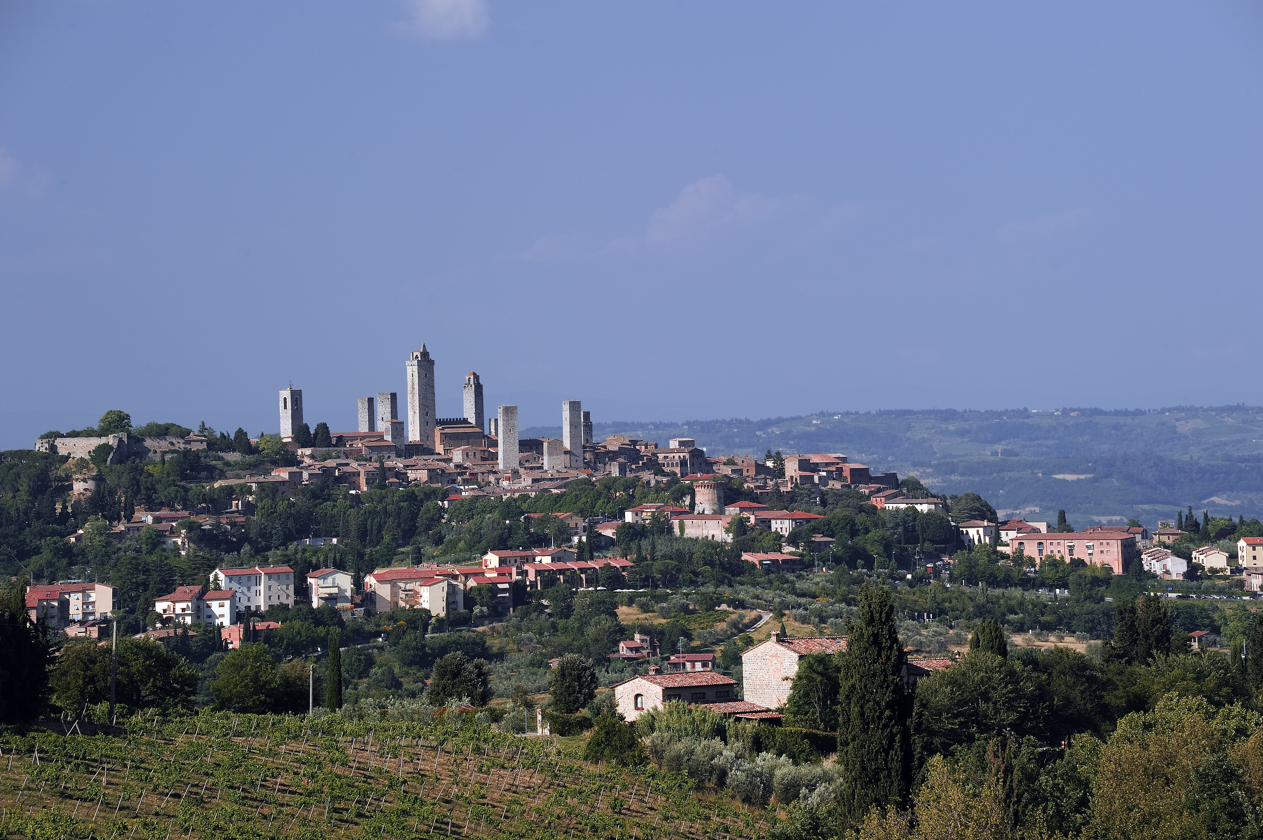 Panorama di San Gimignano